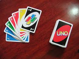 Cartas tradicionales UNO